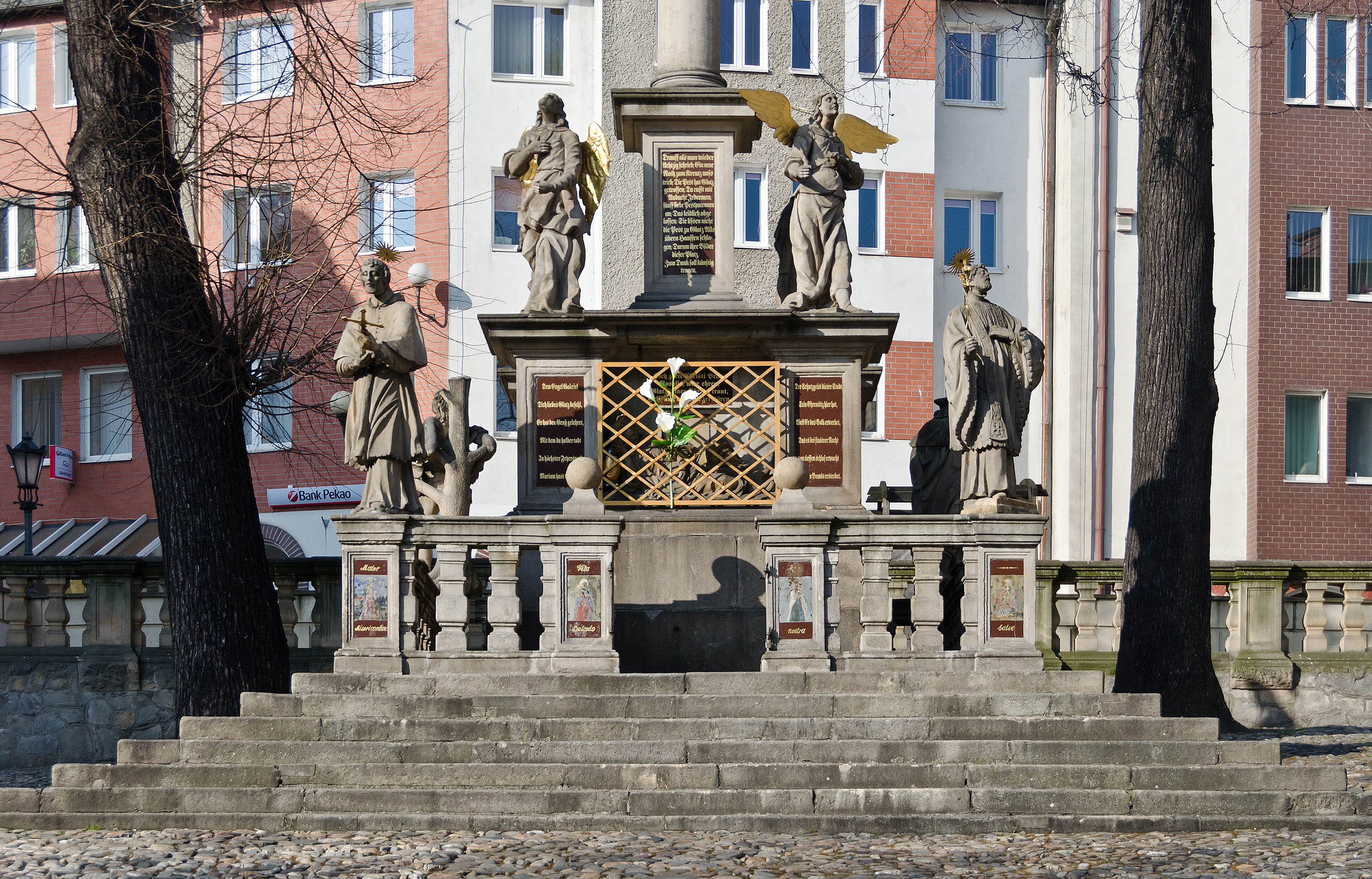 Kłodzko, kolumna z figurą Matki Boskiej, 1680